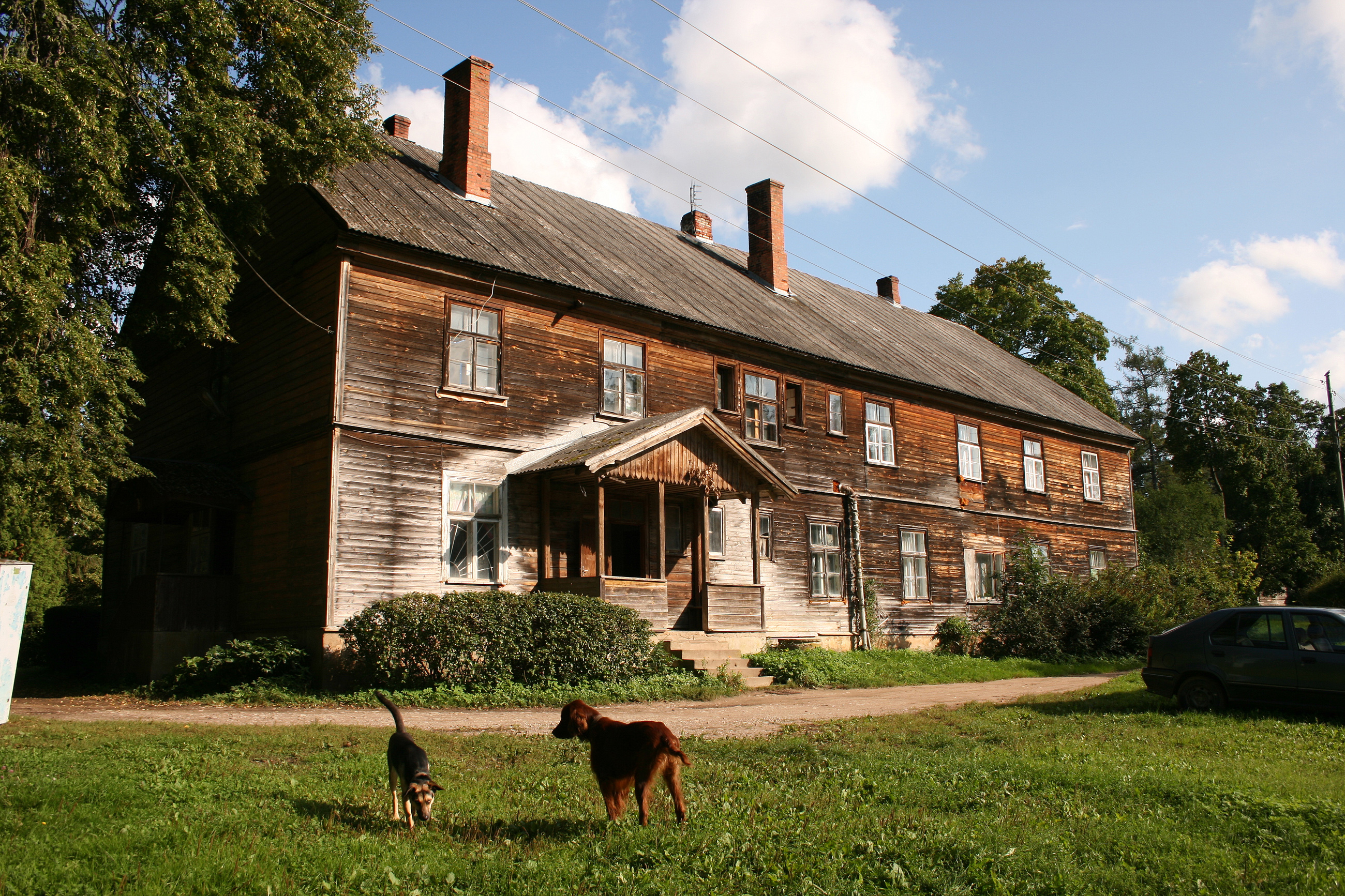 Mezmuiza manor (Mežmuiža)